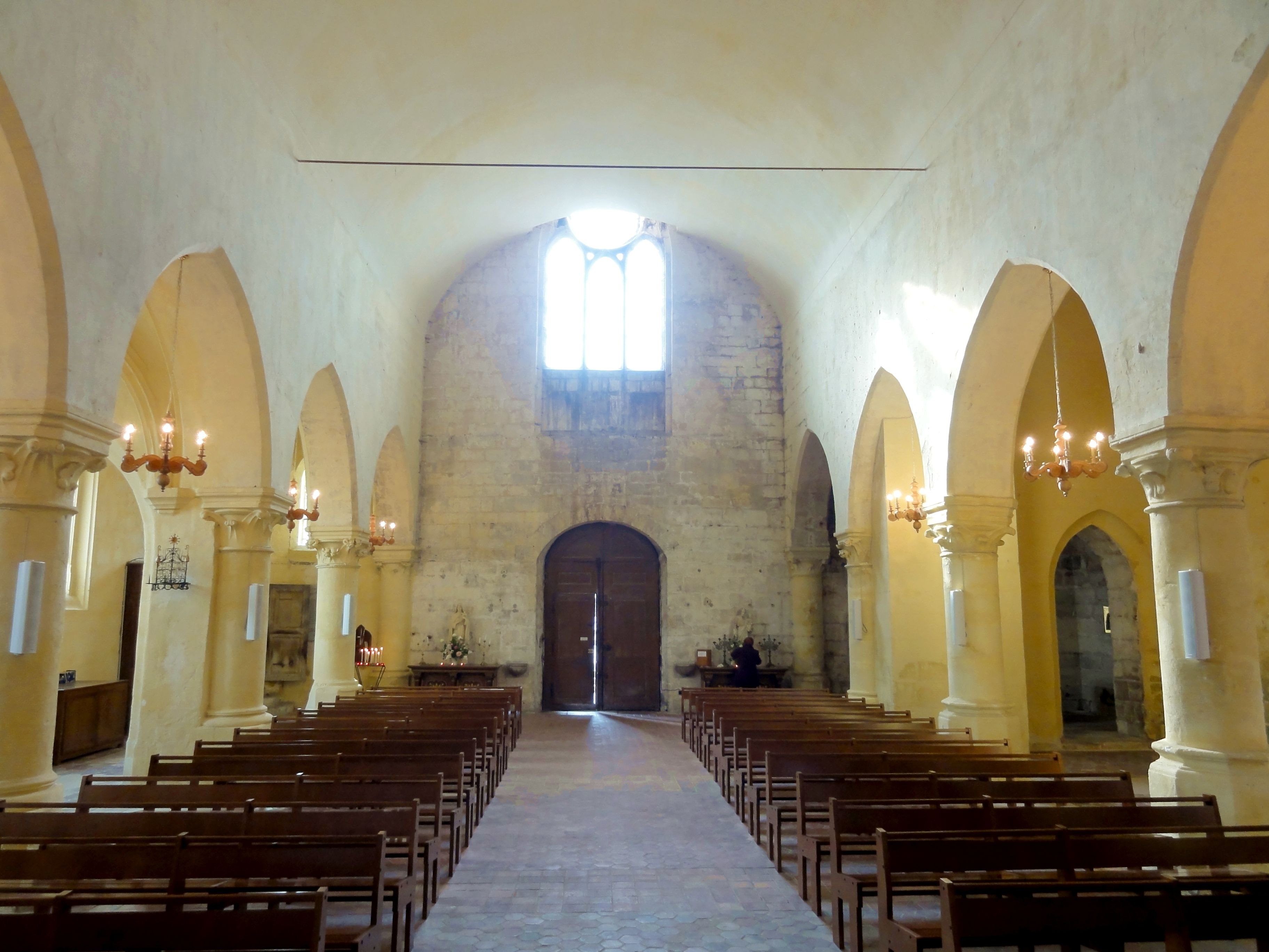 Nef, vue vers l'ouest.